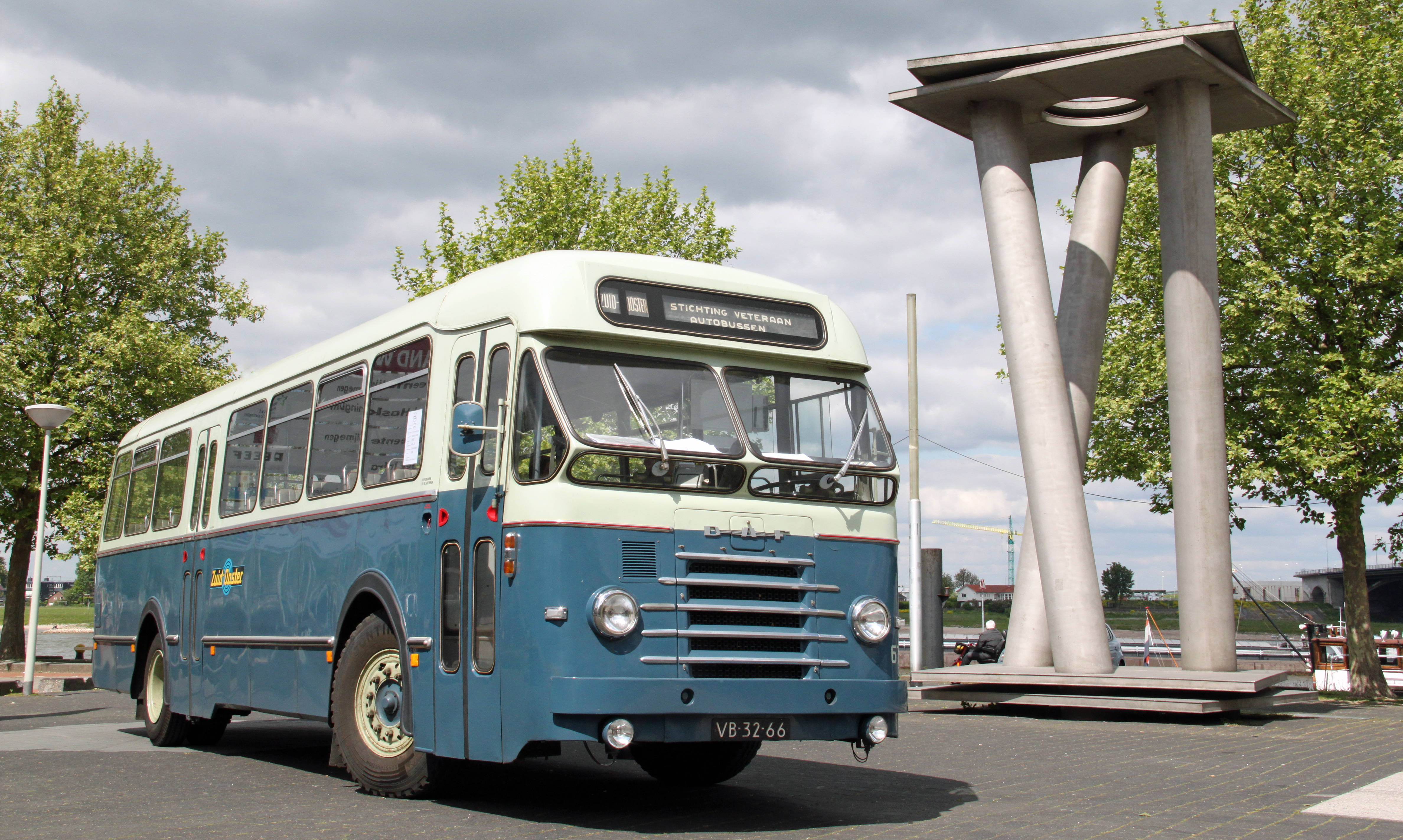 De Zuidooster 6778 van de werkgroep Brabant van de Stichting Veteraan Autobussen tijdens een excursie op de Waalkade in Nijmegen.